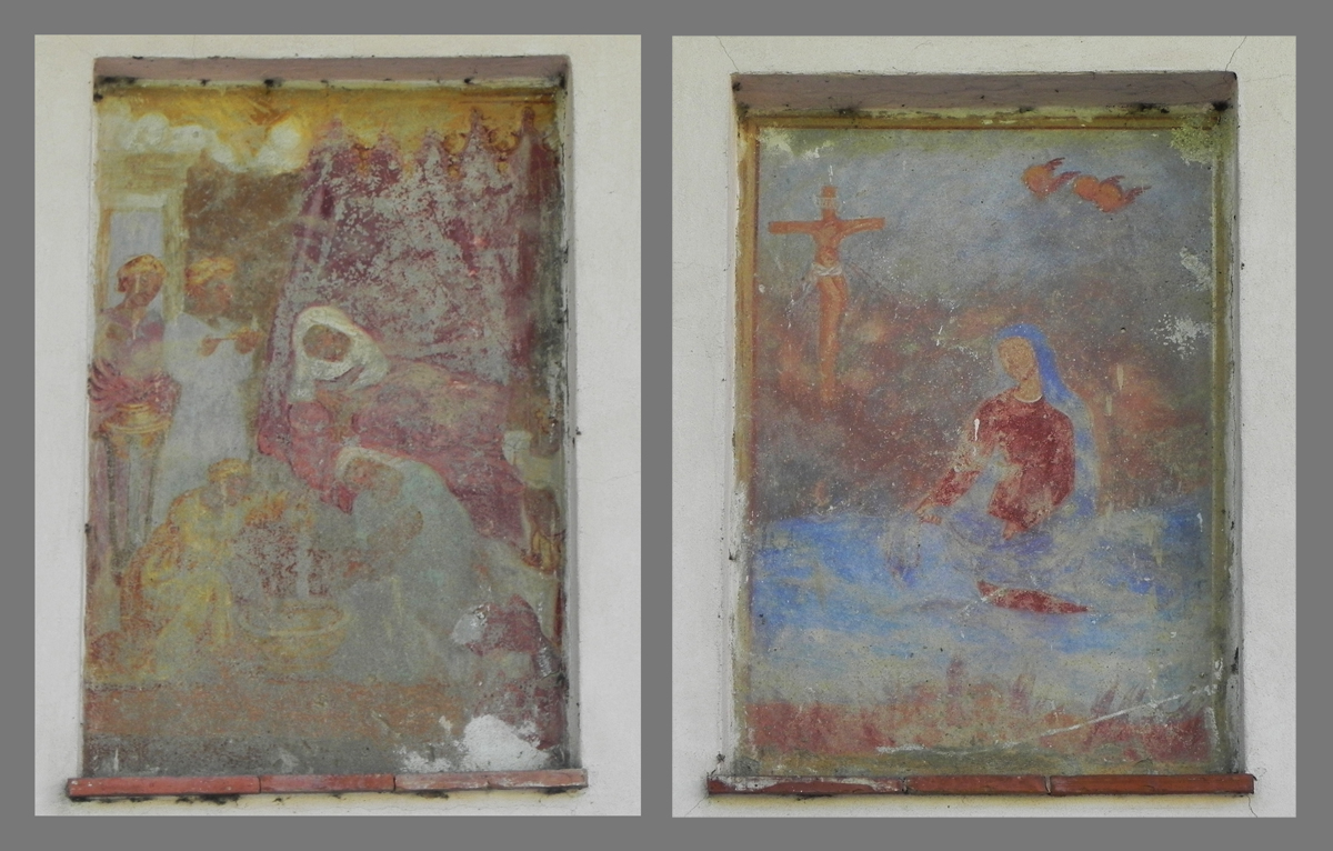 Gli affreschi esterni della Chiesa della Madonna delle Grazie (Gorno).jpg